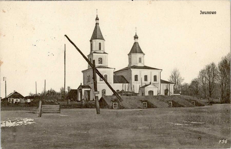 Беларуская (тарашкевіца): Янаў (Janaŭ), пляц Рынак (plac Rynak). Царква-мураўёўка